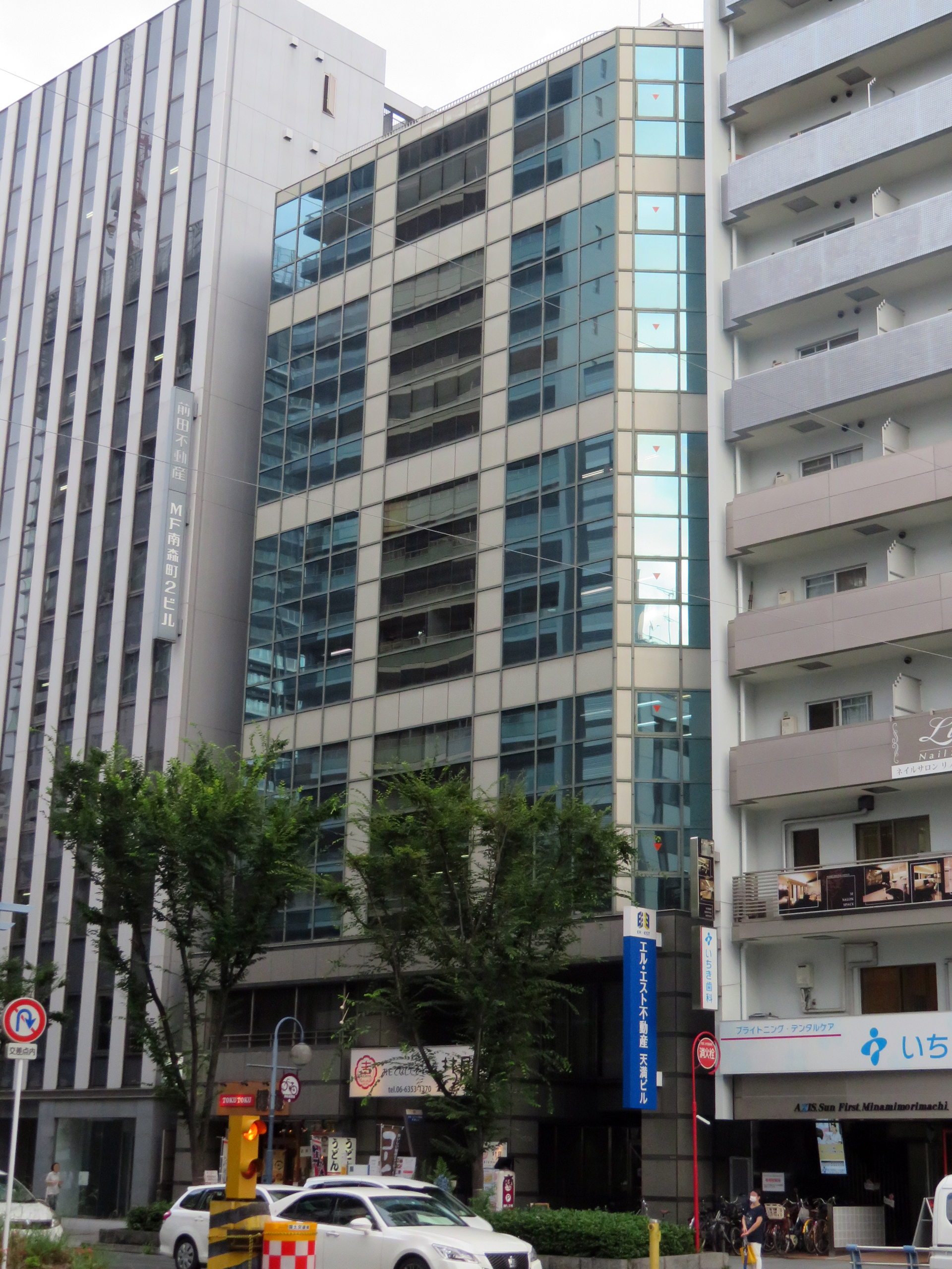 エル・エスト不動産天満ビルを撮影。